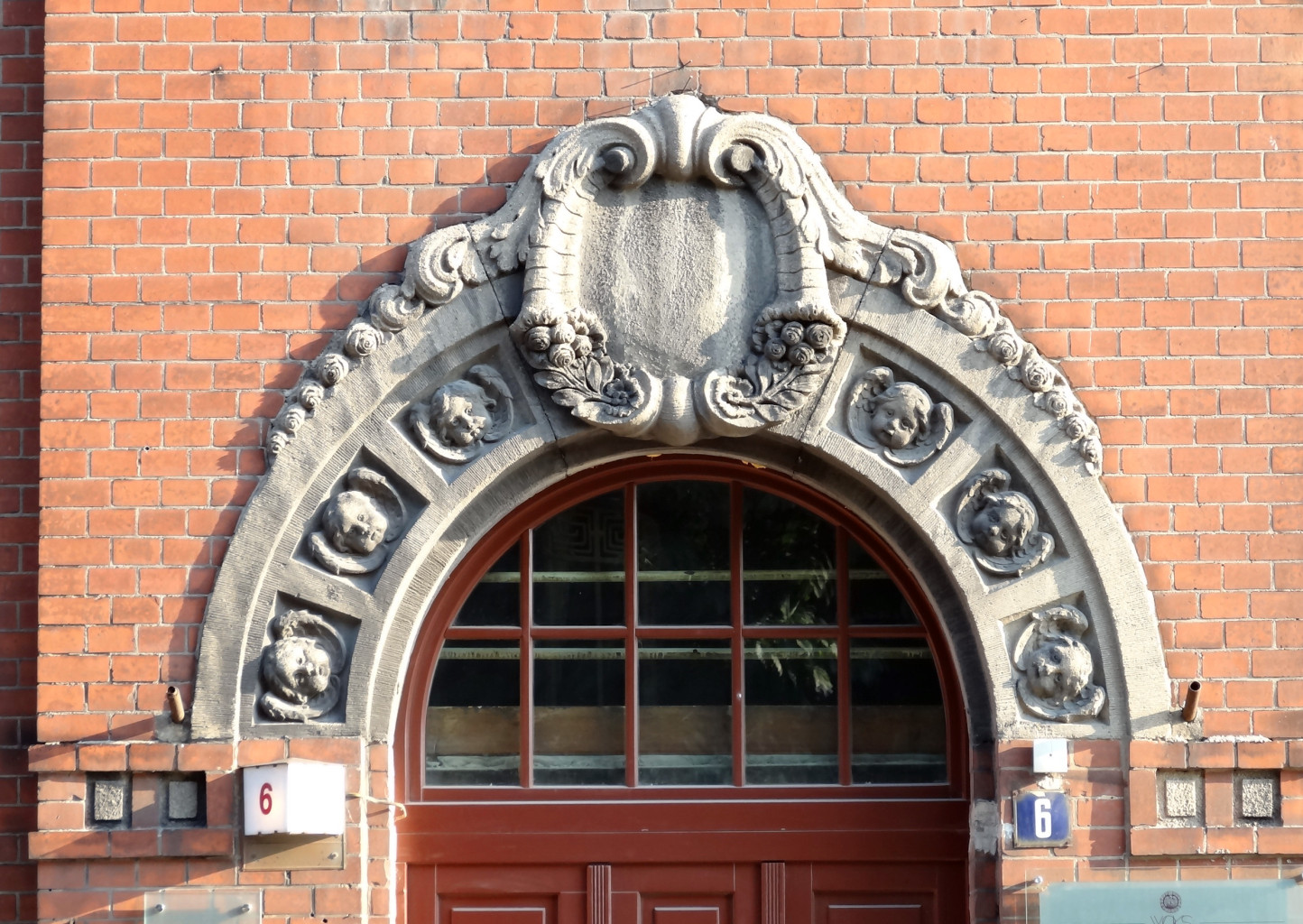 Budynek dawnej ochronki dla dzieci, zbud. 1908-1909, ob. siedziba Wojewódzkiego Ośrodka Kultury "Stara Ochronka" w Bydgoszczy pl. Kościeleckich 6